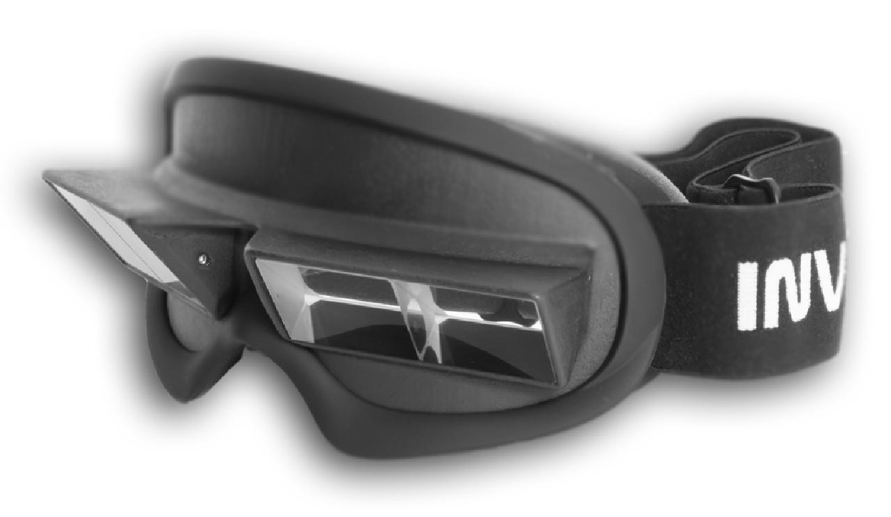 Инвертоскоп с полем зрения: - По горизонтали - 147° - По вертикали - 68°